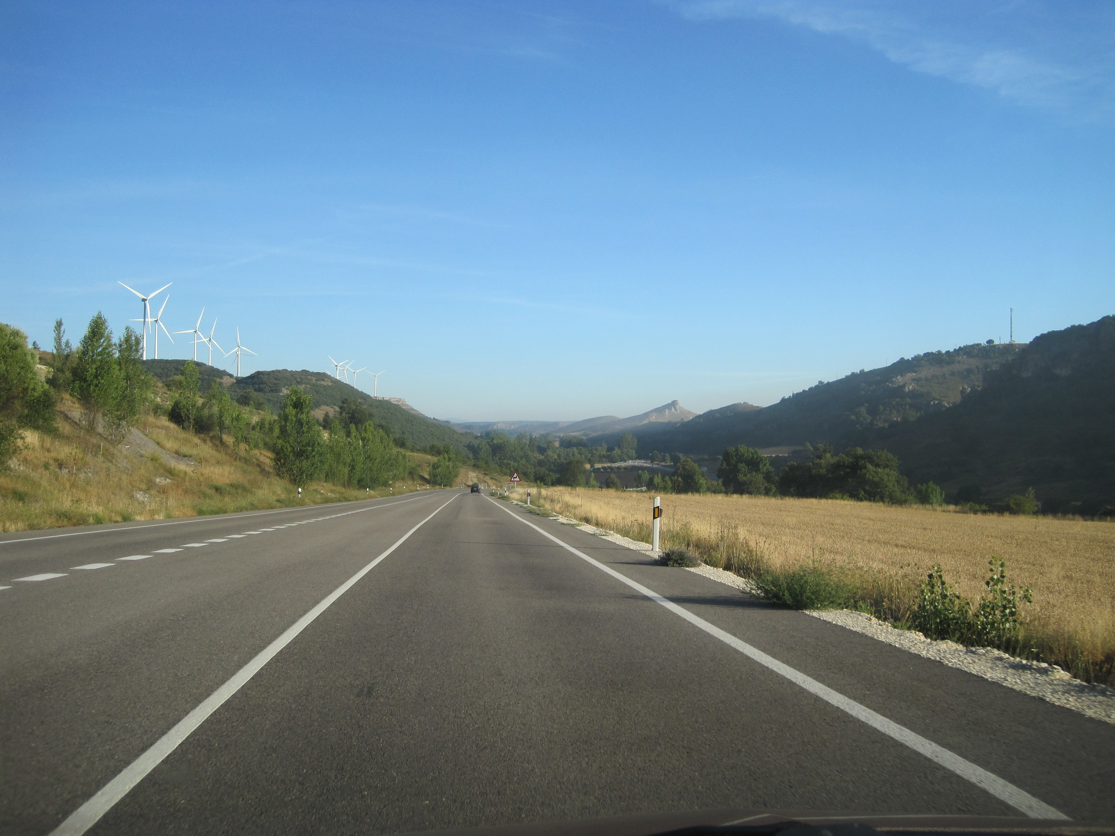 Vista de la carretera N-627 cerca de Montorio